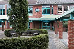 Werner-Jaeger-Gymnasium Nettetal Eingang